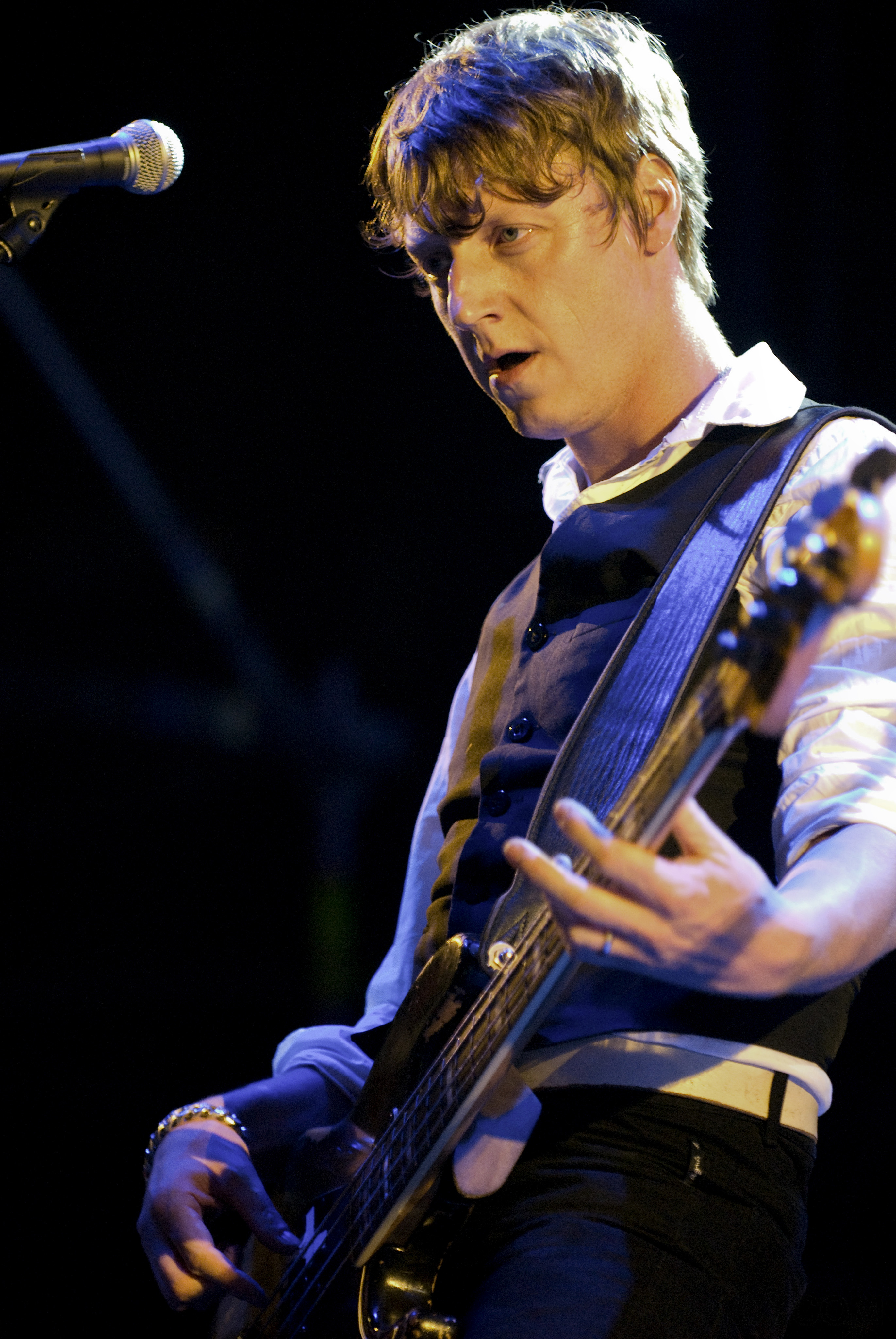 Travis